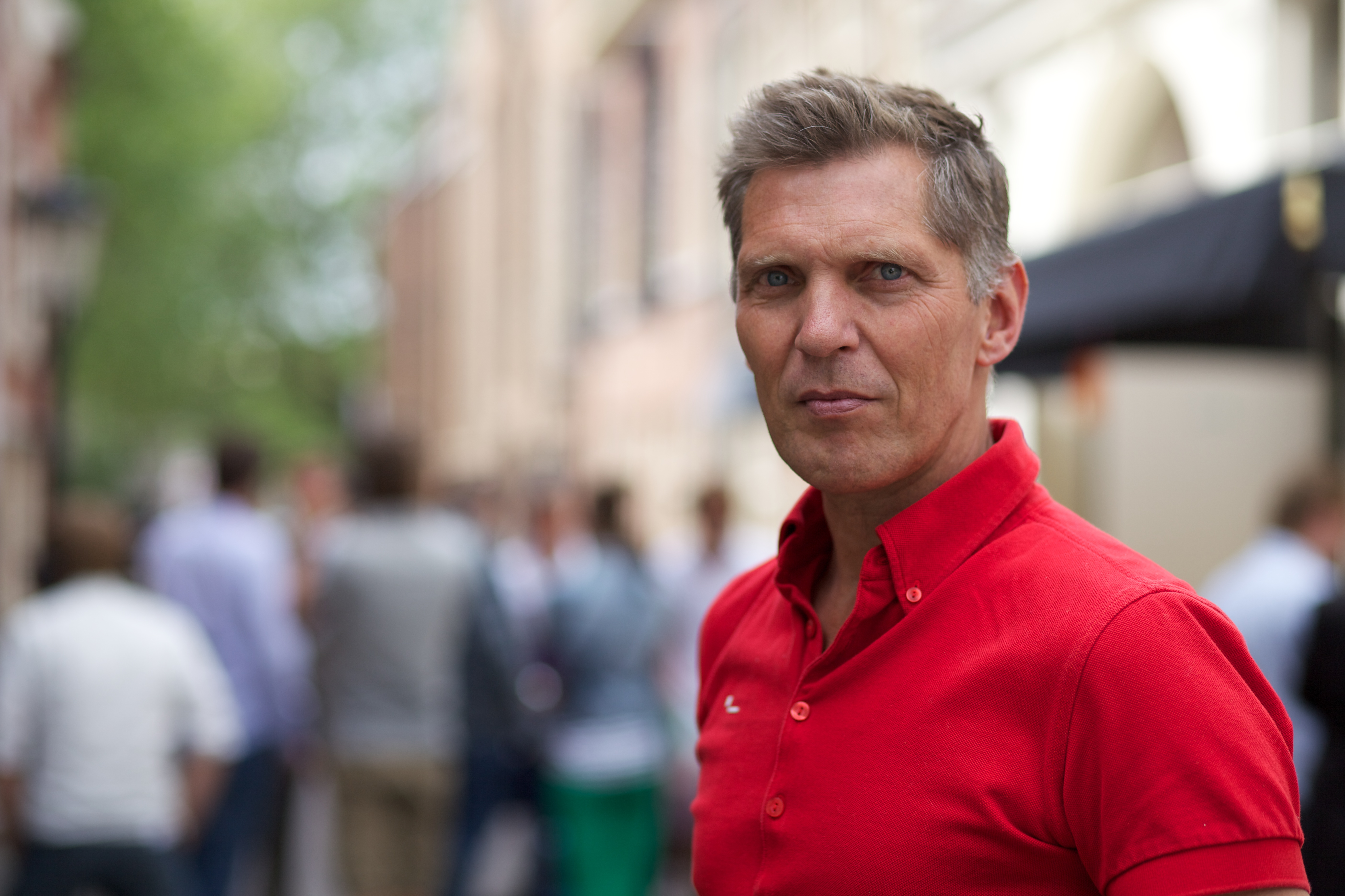 Photo prise le 30 Mai 2012 à Utrecht